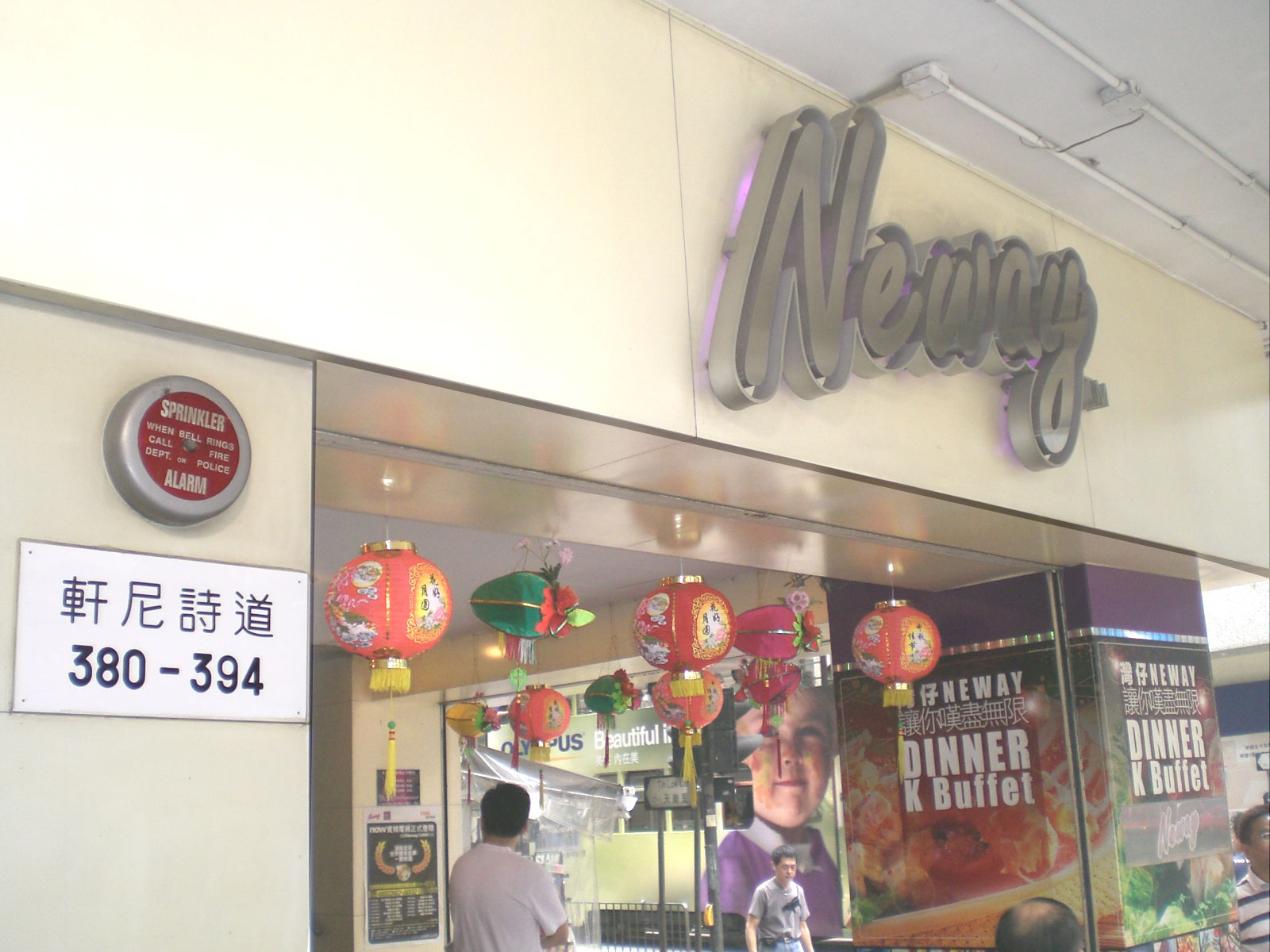 軒尼詩道 Neway